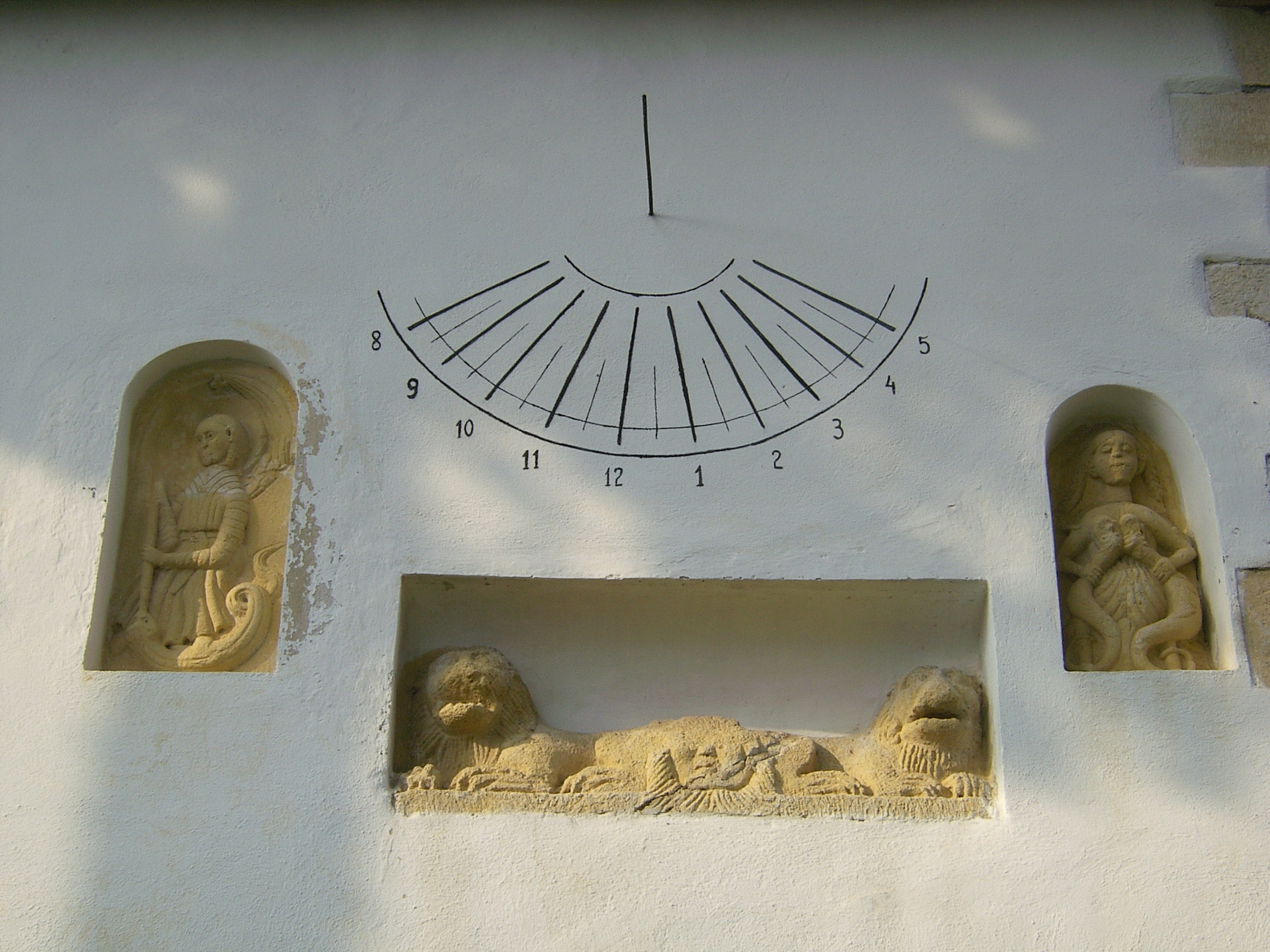 Szoborcsoport a Magyargyerőmonostori templom homlokzatán